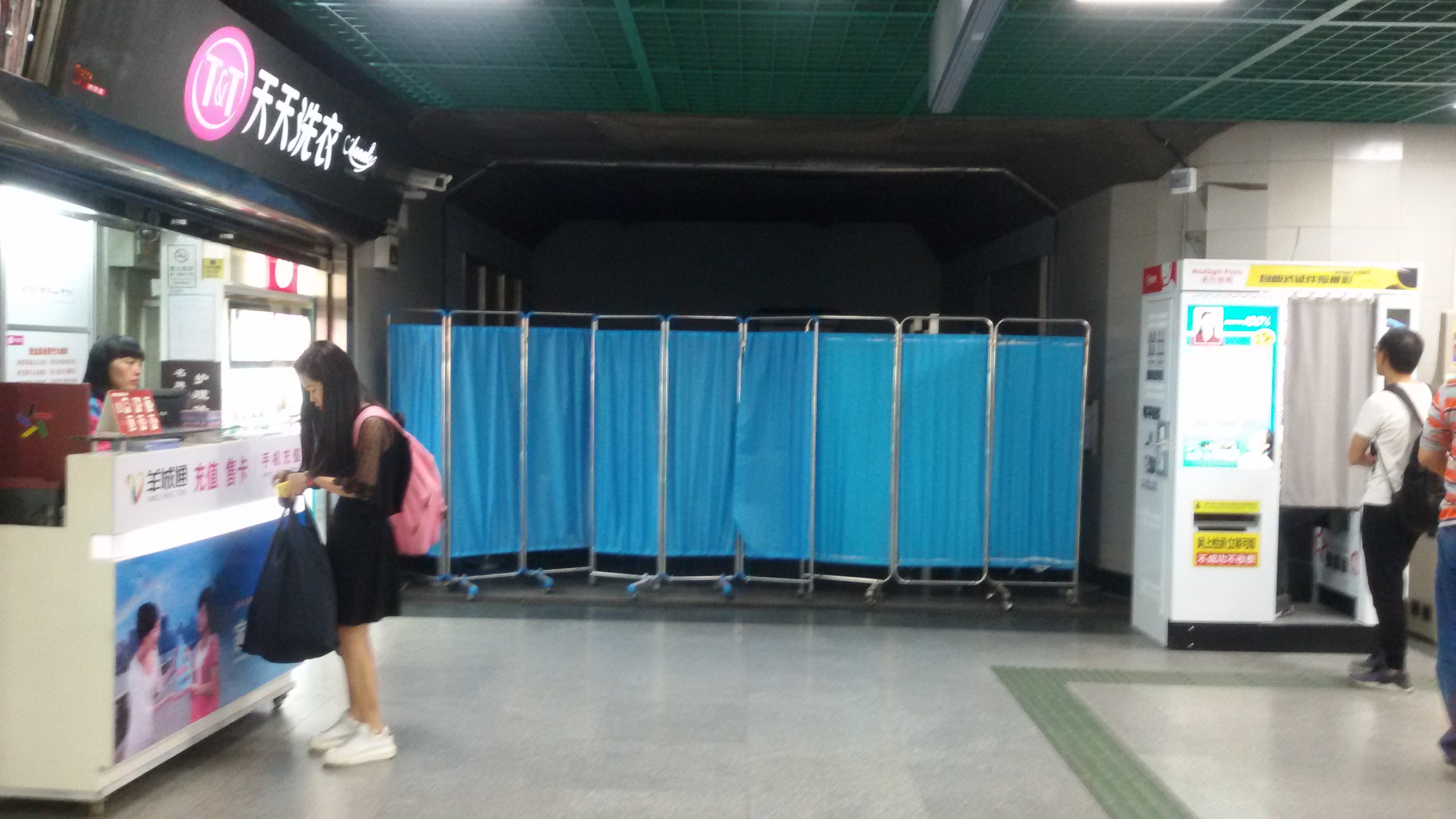 粵語: 2017年11月5號，喺廣州地鐵陳家祠站B出入口附近，喺地鐵1號綫開通廿年之後一直未見佢開。